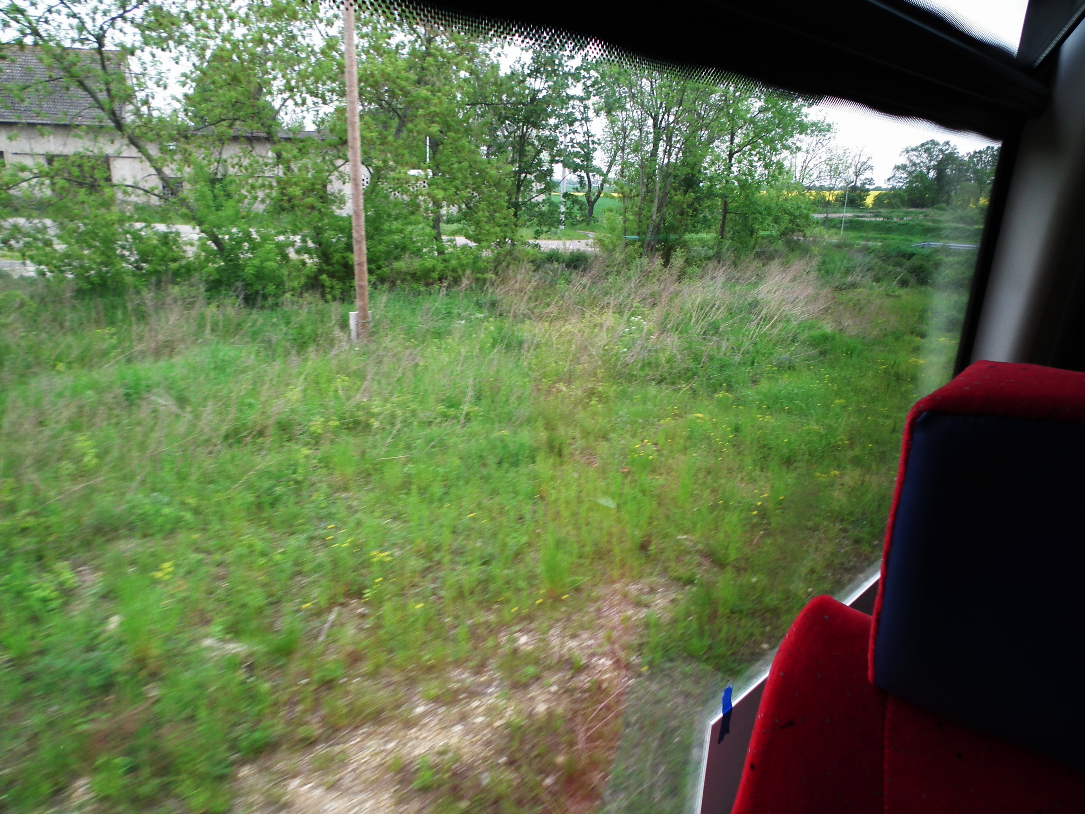 Krobusz koło Prudnika. Dawna stacja kolejowa - równia stacyjna.